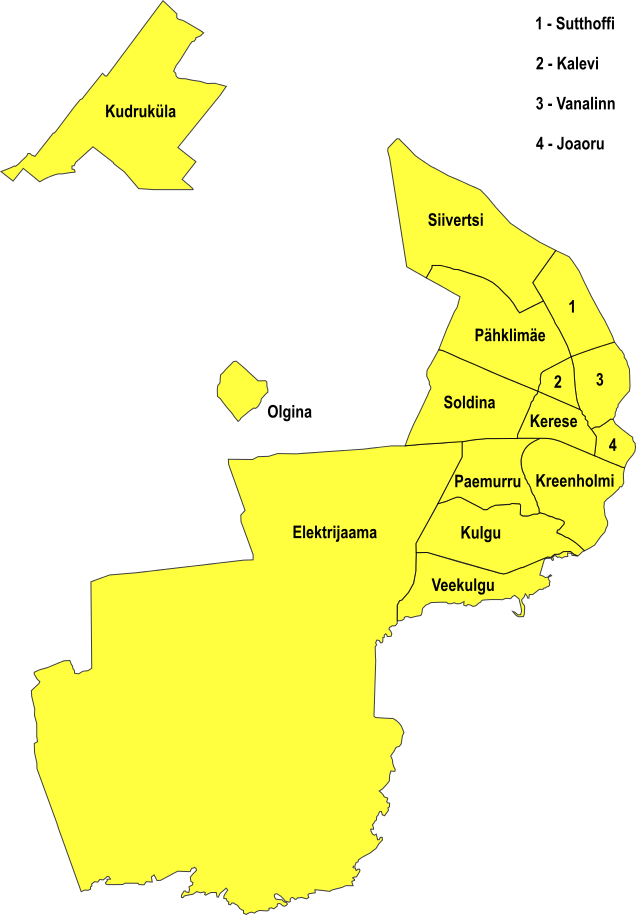 Narva linnaosad